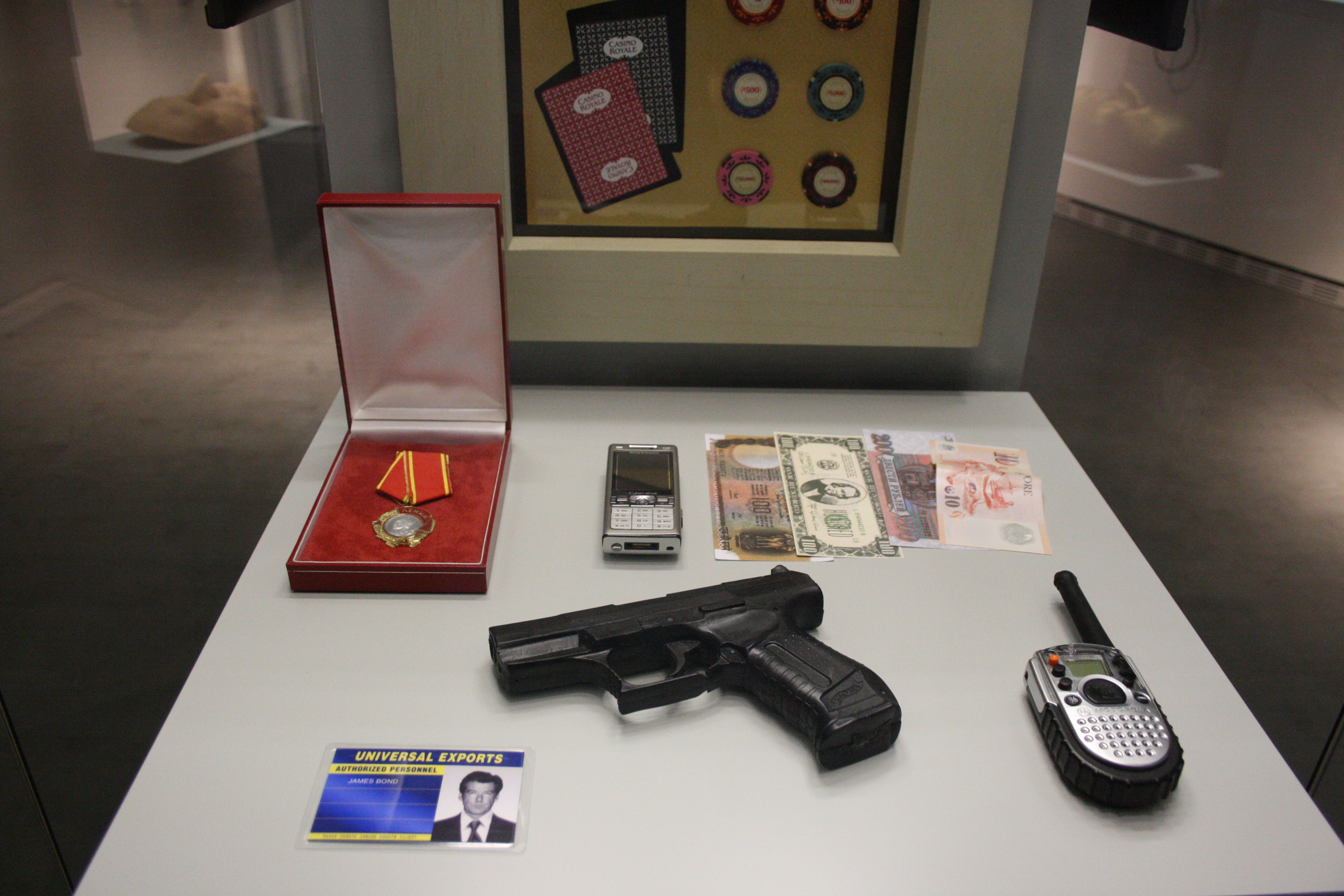 James Bond Requisiten im Spy Museum Berlin